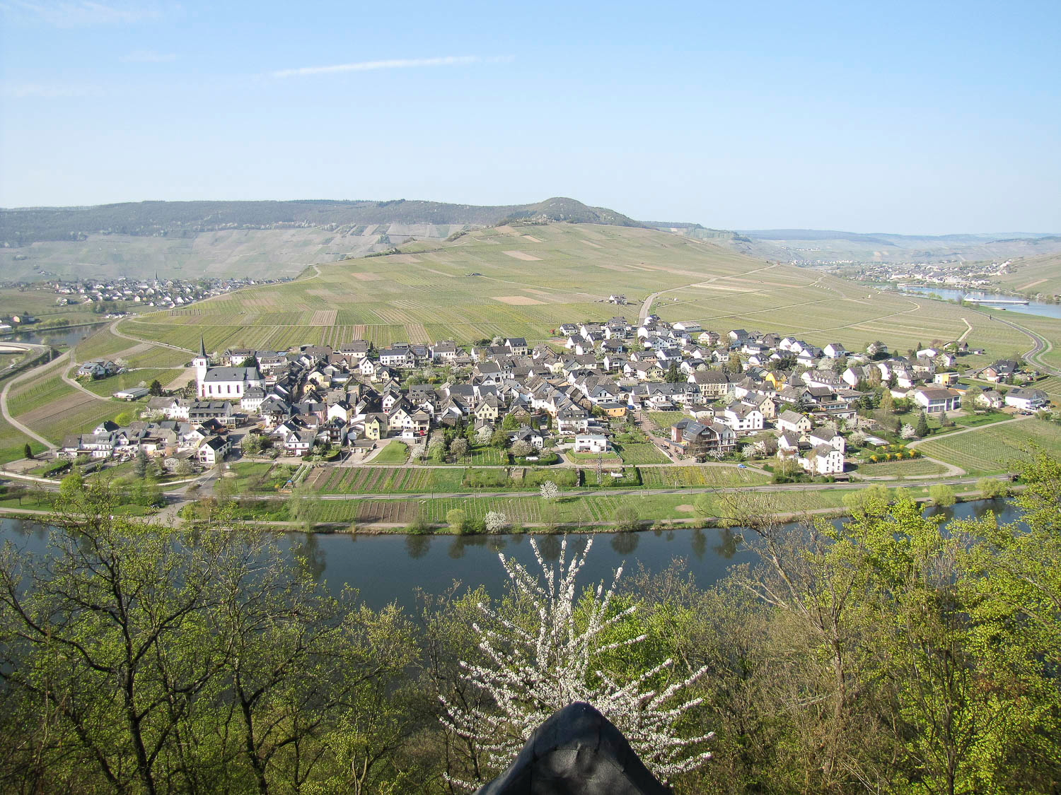 Diese Foto zeigt Minheim im Frühjahr. Das Foto wurde vom Kreuz auf der anderen Moselseite angefertigt.